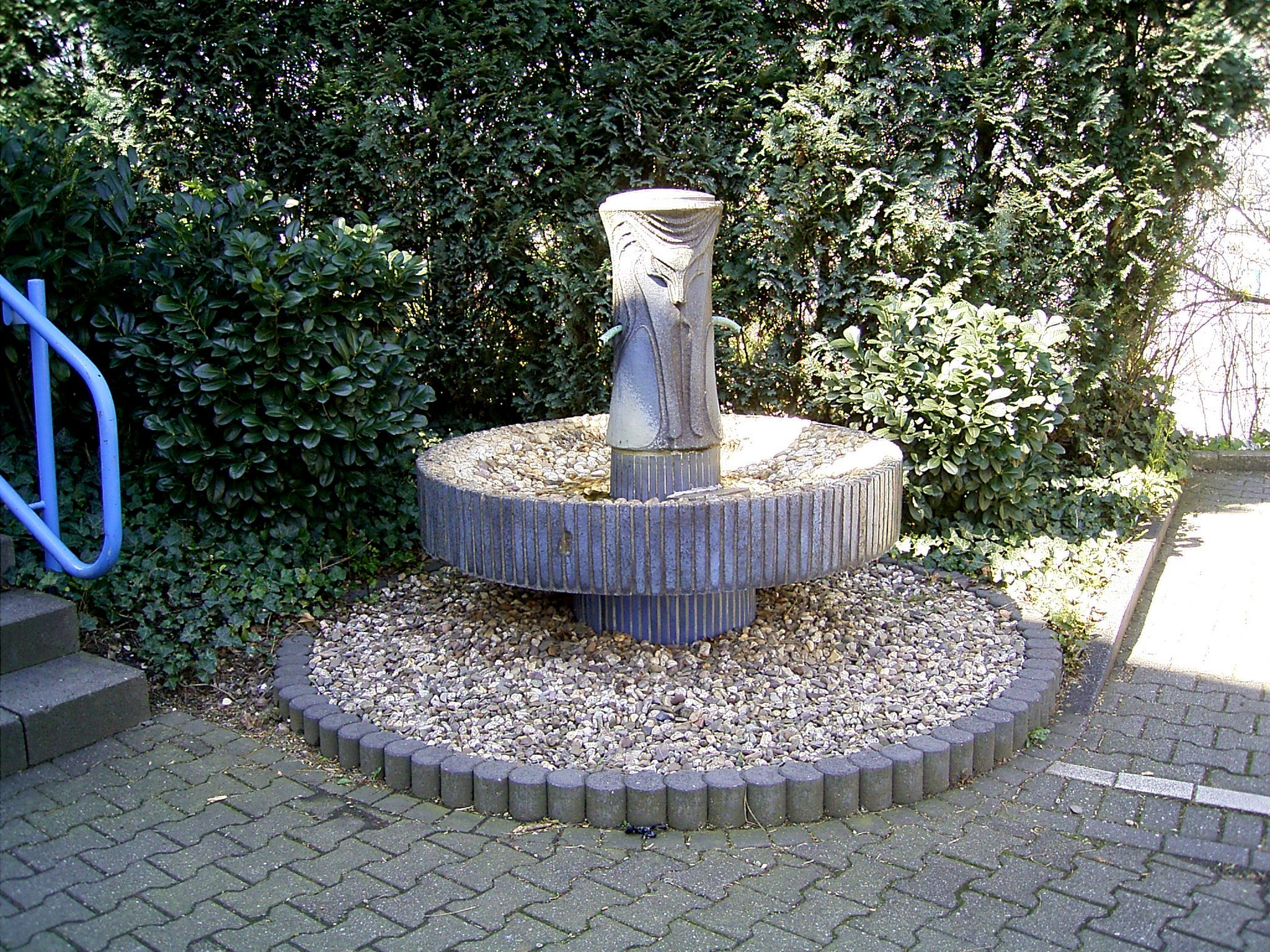 Fuchsbrunnen in Wuppertal